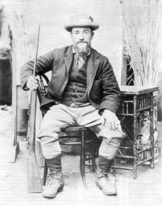 Generaal CR de Wet